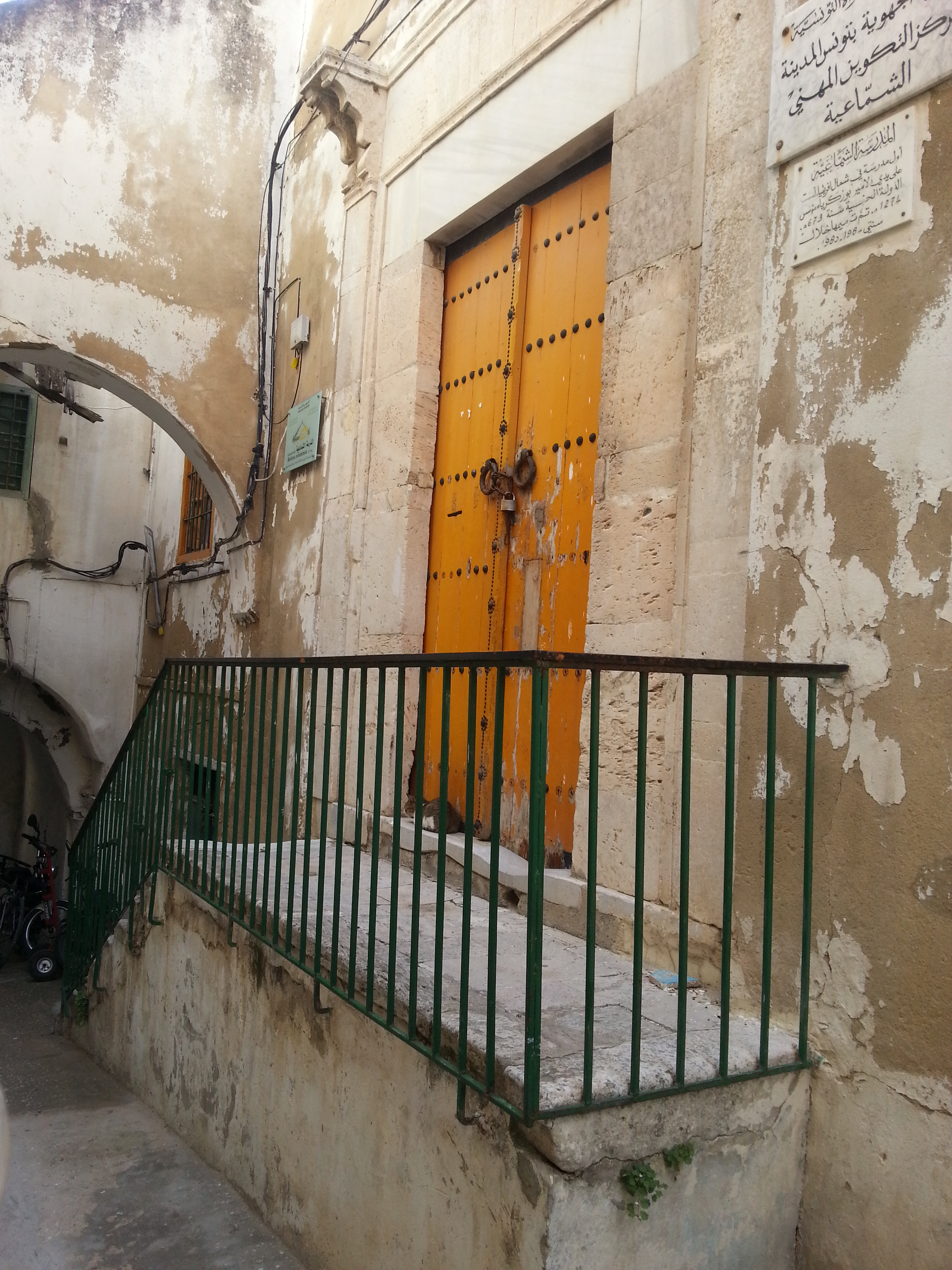 Medersa Echamaia, Tunis